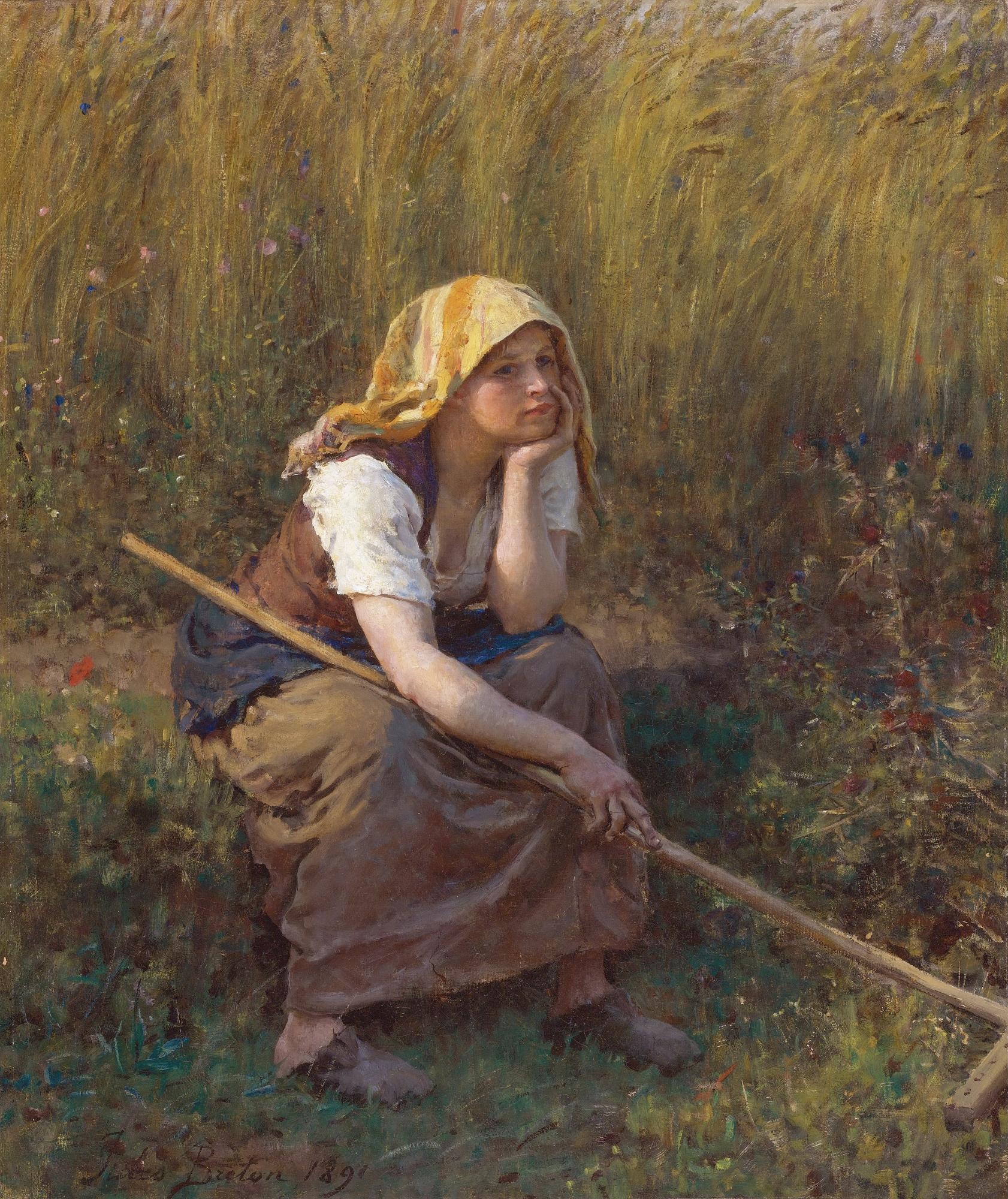 ÉtéSummertitle QS:P1476,fr:"Été"label QS:Len,"Summer"label QS:Lde,"Sommer"label QS:Lpl,"Lato"